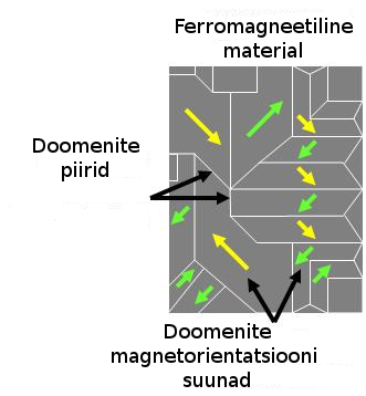 Doomenid ferromagneetilises aines